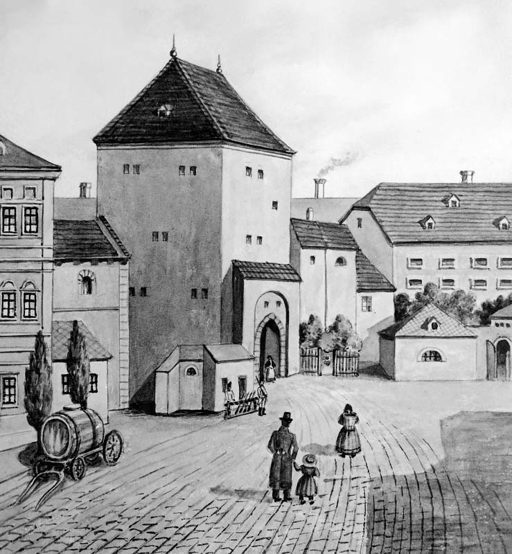 Brněnská brána, jedna z pěti bran brněnského opevnění. Zanikla v 19. století. Kresba L. Masura.